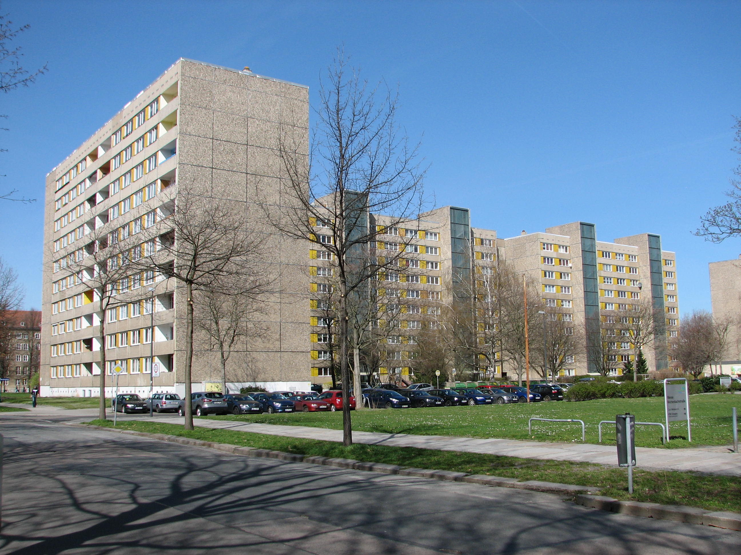 Wohnbauten an der Hochschulstraße, Nr. 24 bis 32, Blick von der Reichenbachstraße (Plattenbau Typ IW 67)